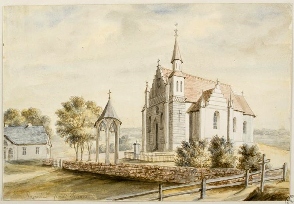 Беларуская (тарашкевіца): Ражанка (Ražanka), завулак Горны (zavułak Horny). Касьцёл Сьвятых Апосталаў Пятра і Паўла